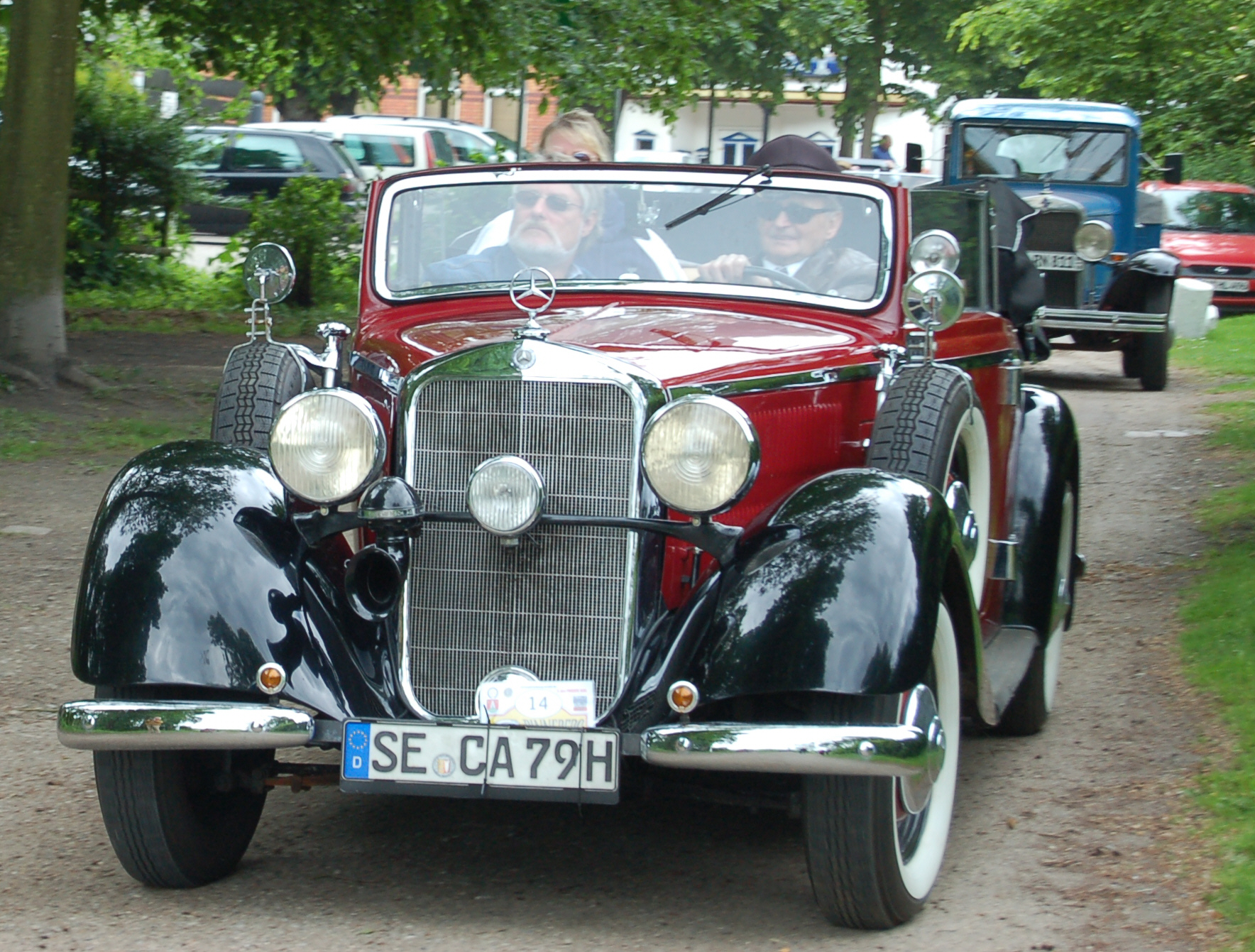 Ein Mercedes-Benz W143, 6 Zylinder, 2300 ccm, 55 PS, auf dem Weg zum Oldtimertreffen in Uetersen